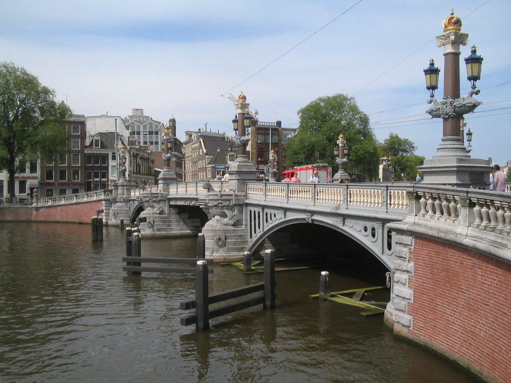 Blauwbrug (Amsterdam, Netherlands), july 2005